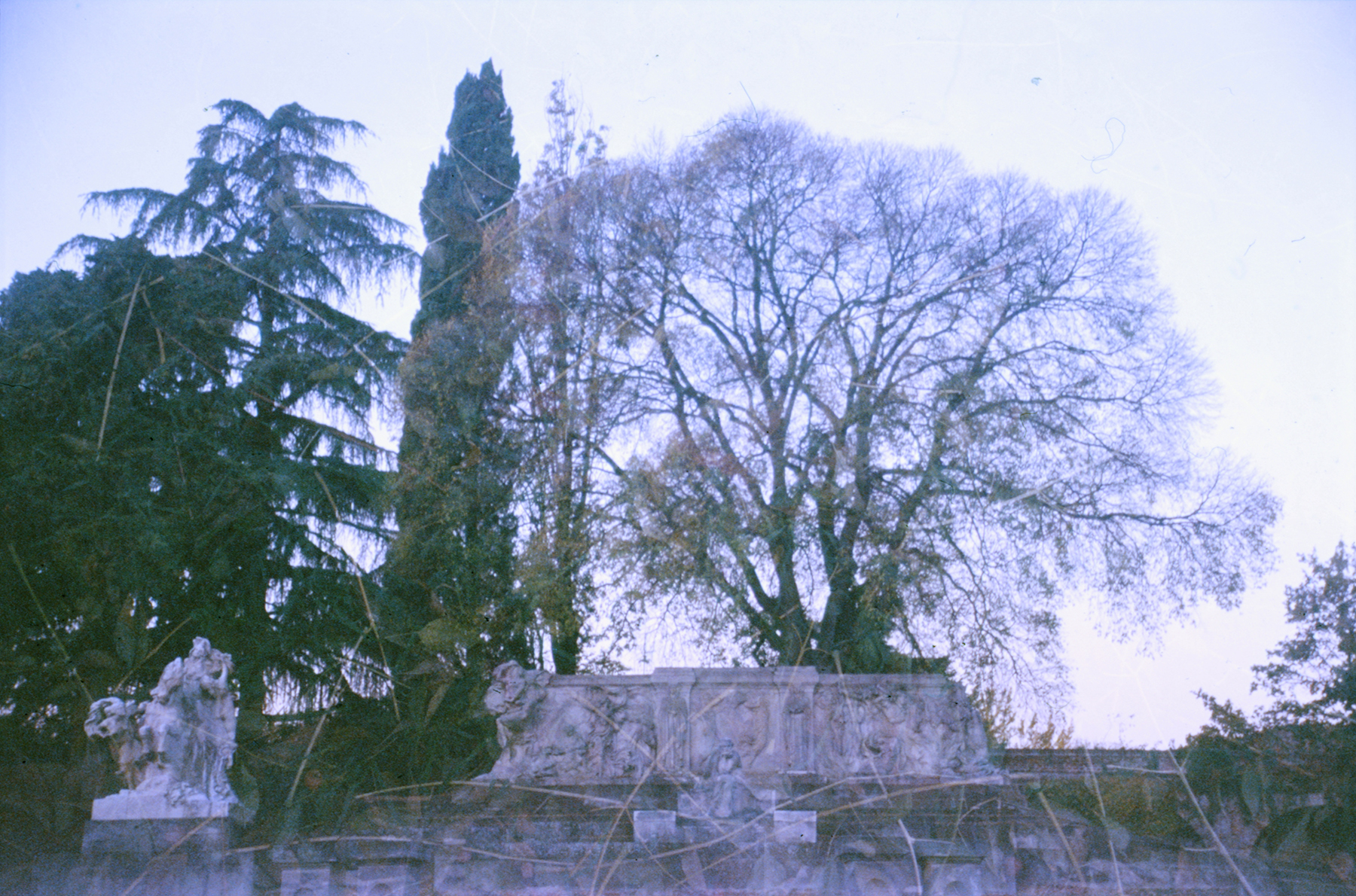 Monumento a Giosuè Carducci di Piazza Carducci a Bologna. Inaugurato nel Giugno del 1928, progettao da Leonardo Bistolfi. Protagonista del monumento è il Bagolaro che, con il tronco superante i tre metri e mezzo di circonferenza, porge la sua chioma sopra la testa della statua del poeta.